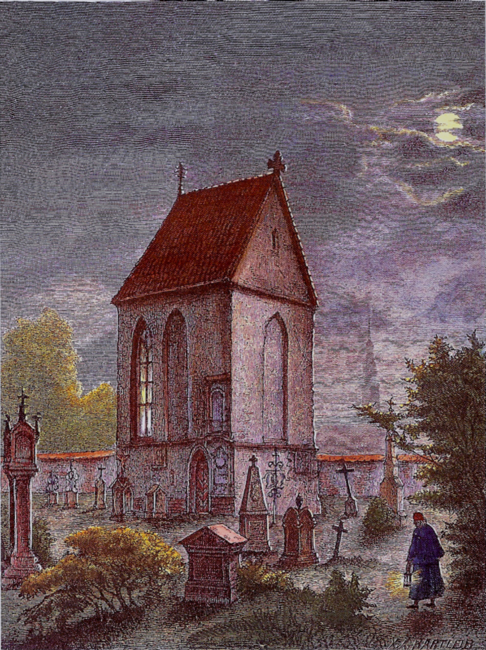 Agnes Bernauer chapel in Straubing